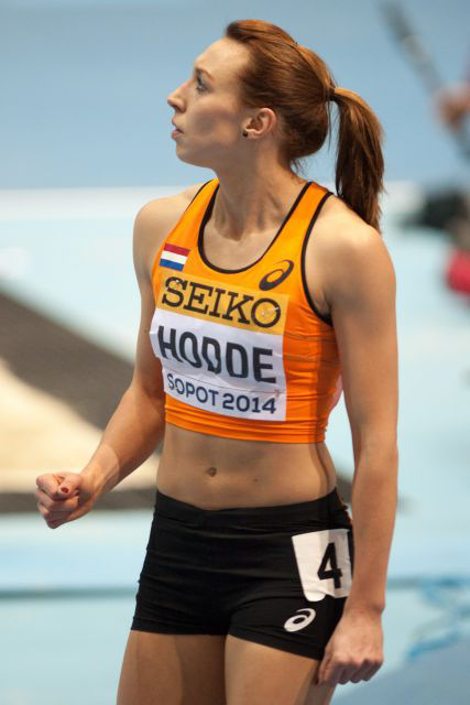 Rosina Hodde tijdens de WK Indoor van 2014, Sopot.